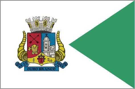 Bandeira do município de Ouro Branco, MG, Brasil.